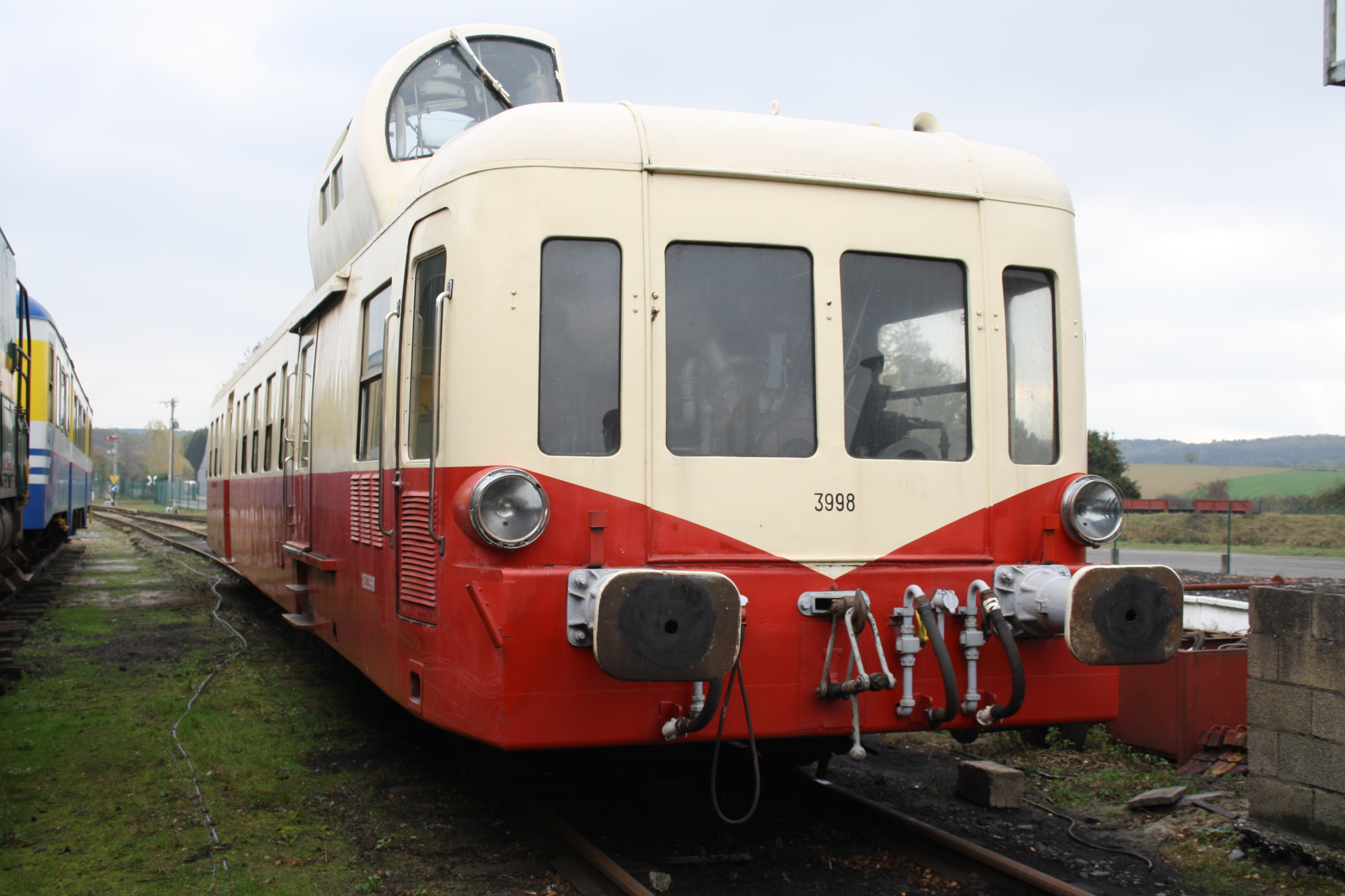 Picasso-Triebwagen ex SNCF beim Chemin de fer à vapeur des 3 vallées